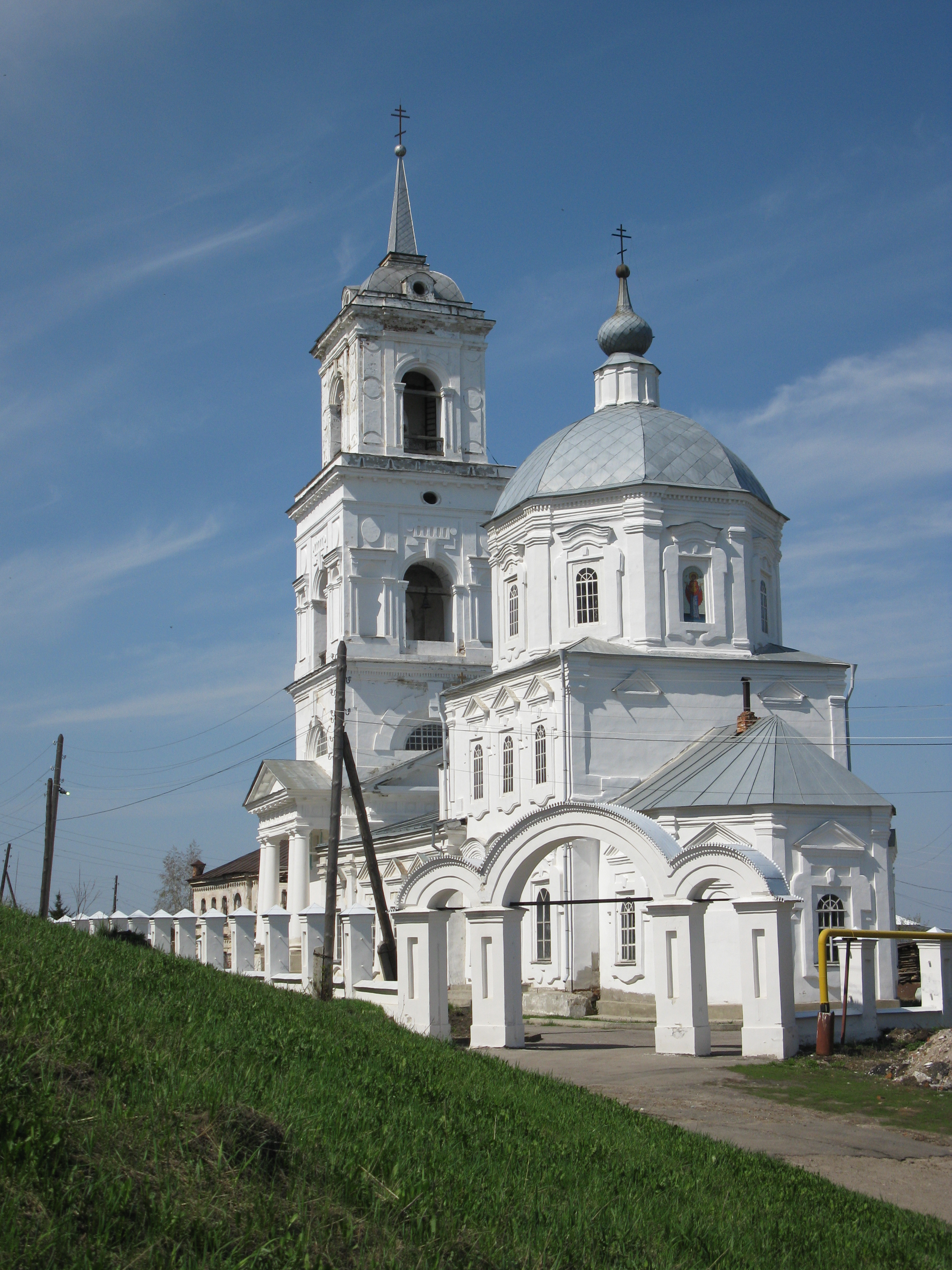 Церковь Знаменская (святителя Николая): площадь Октябрьской Революции, 26, Алатырь, Чувашия